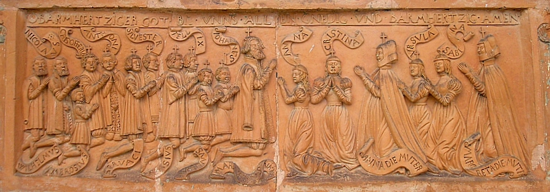 Friedhofskapelle zu den Vierzehn Nothelfern (Welden, Landkreis Augsburg, Bayerisch-Schwaben). Epitaph Hohenrainer (um 1566), Detail. Eigene Aufnahme, Sept. 2007 / Cemetery chapel "Fourteen Holy Helpers" at Welden near Augsburg (Bavaria, Germany). Epitaph Hohenrainer (ca. 1566), detail. Own photo, Sept. 2007